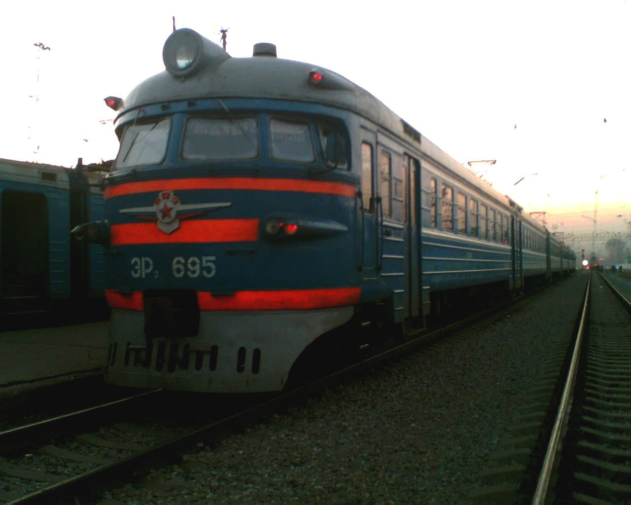 Электропоезд ЭР2.